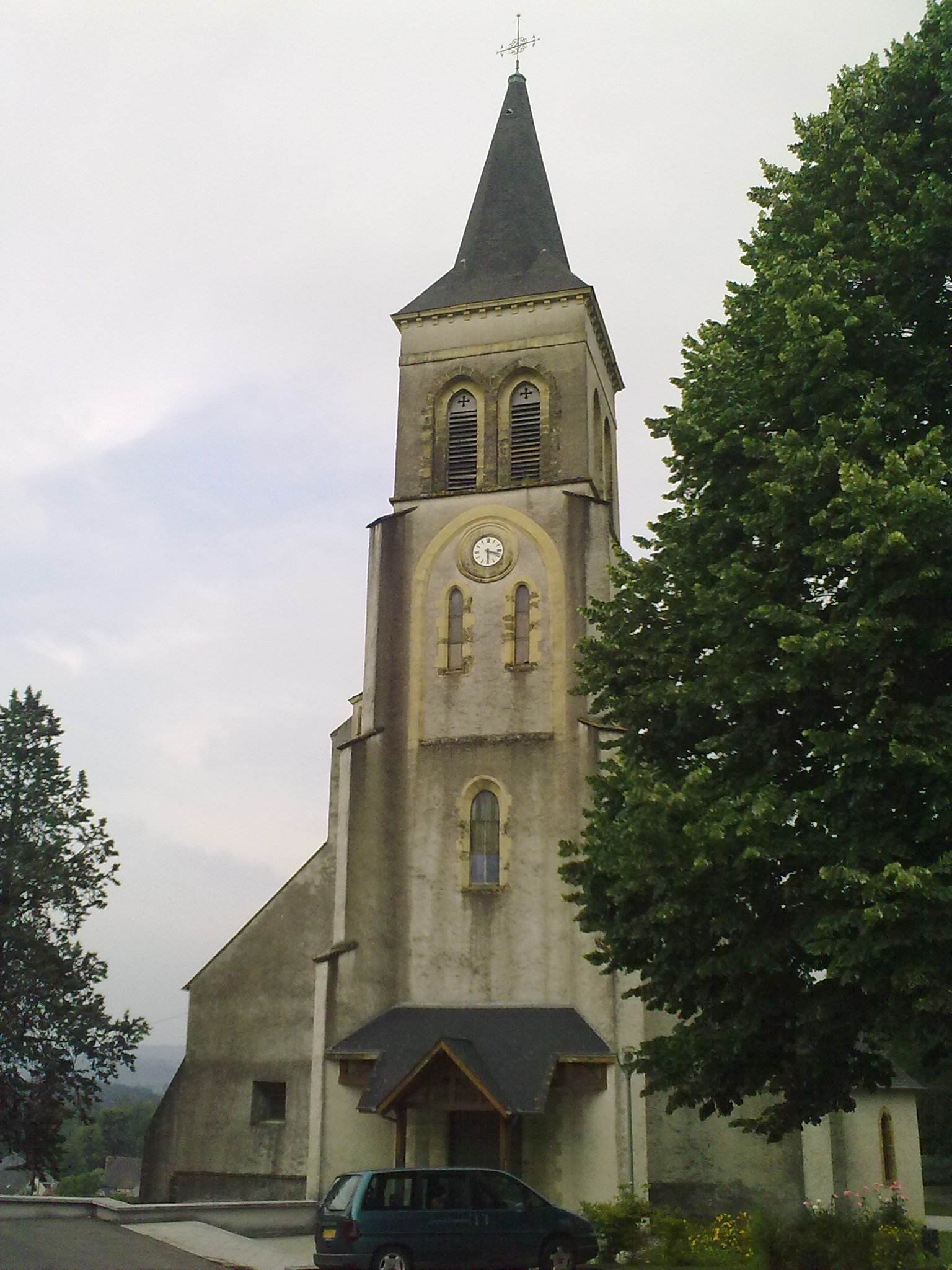 Eglise d'Asson, vue de face.